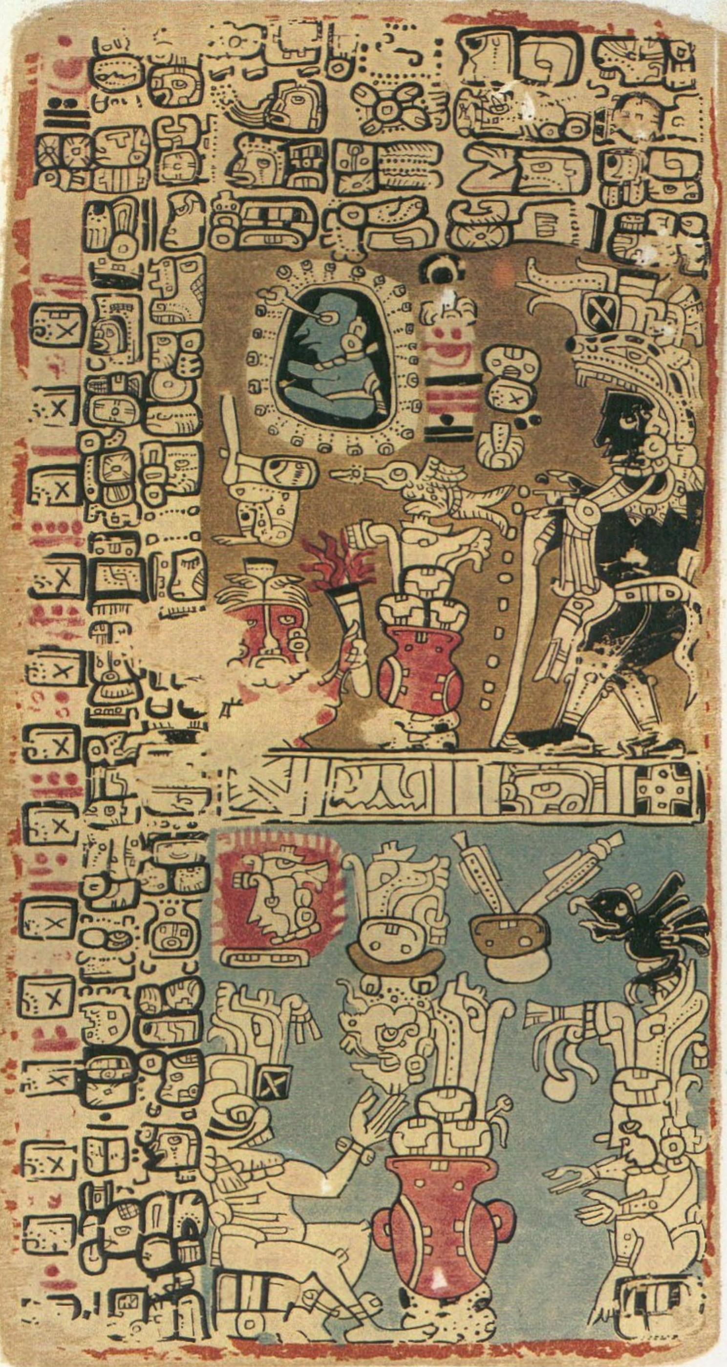 Madrid Codex (Tro-Cortesianus) page 34: astronomy